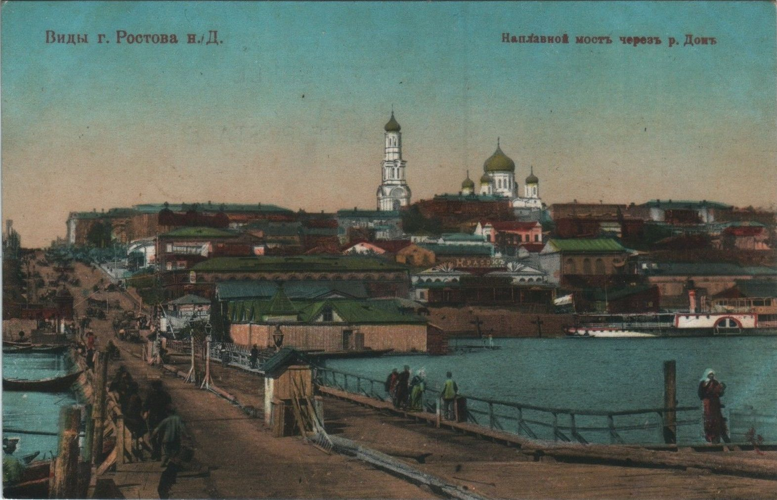 Ростов-на-Дону до Октябрьской революции. Наплавной мост через реку Дон, Таганрогский проспект (ныне Будённовский проспект). Открытка.